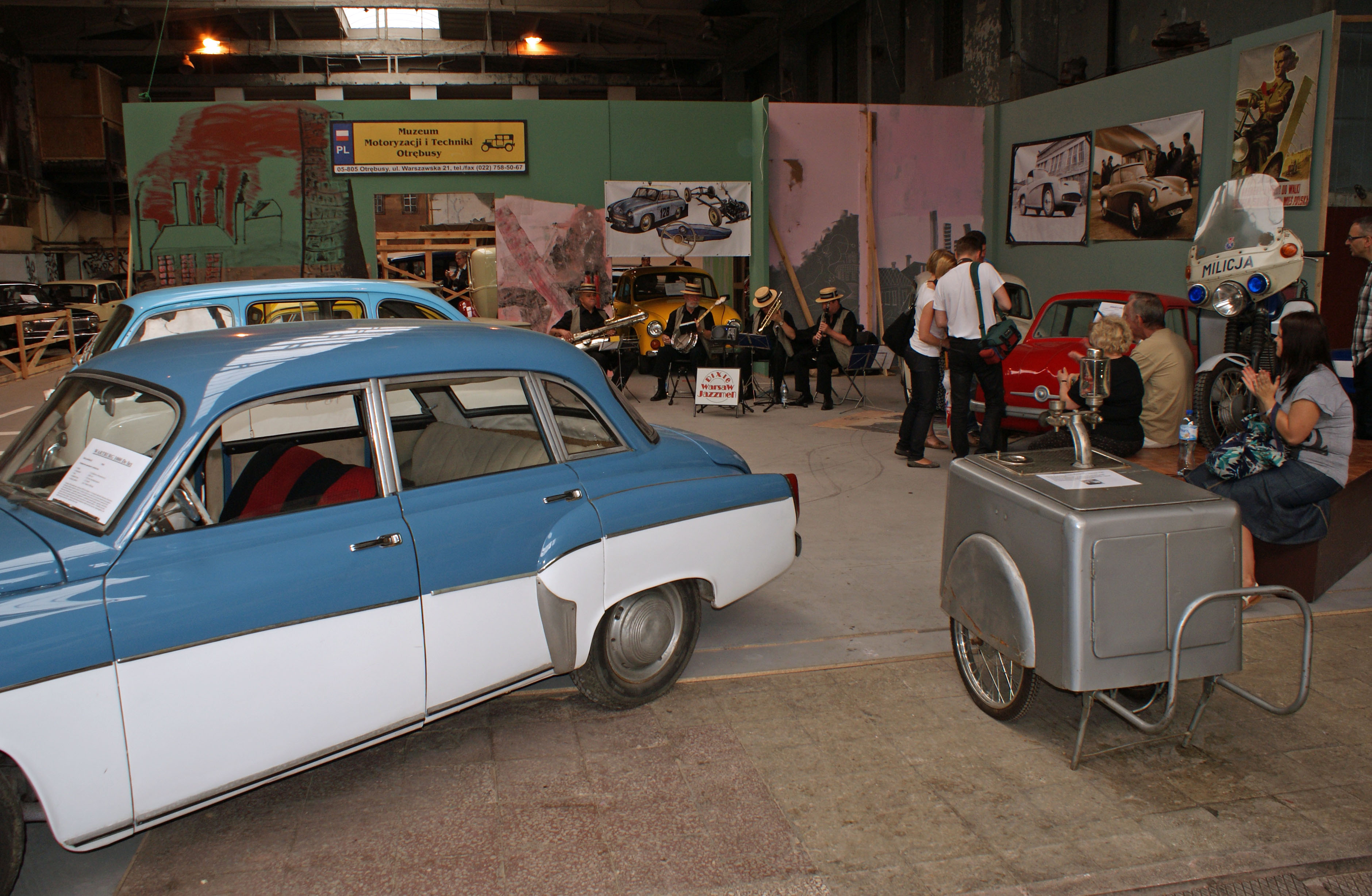 Wystawa Prywatnego Muzeum Motoryzacji i Techniki w Wytwórni Wódek Koneser, Warszawa. Na pierwszym planie, po prawej, saturator wody sodowej w czasach PRL-u. W tle zespół Warsaw Dixie Jazzman.